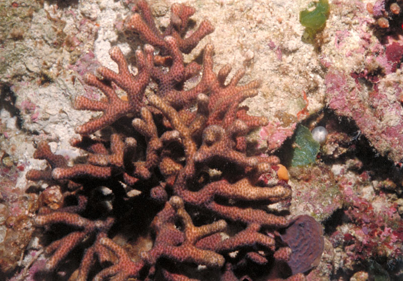 Madracis formosa en Pulley Ridge, Florida